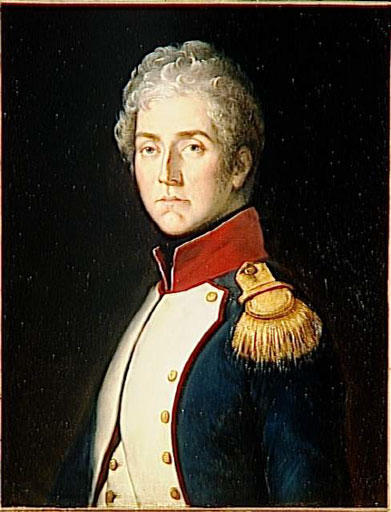 Commandé par Louis-Philippe pour le musée historique de Versailles en 1834